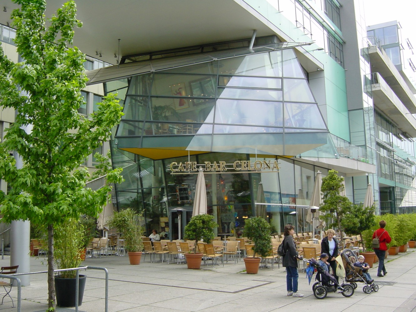 Bildbeschreibung: Behnisch Haus, Krefeld Quelle: selbst fotografiert Fotograf/Zeichner: DER UNFASSBARE